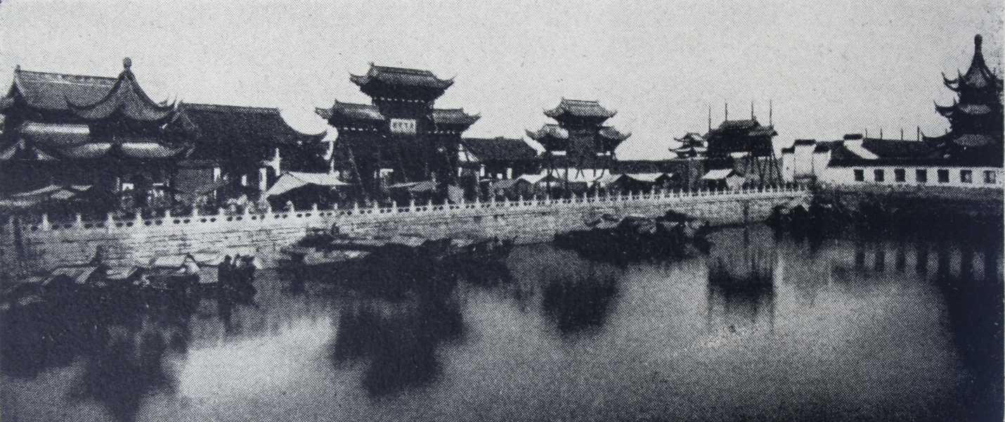 Fotografie E. S. Vráze z knihy Bílý ďábel v Pekingu - Nankin má dosud malebná zákoutí, plná typických staveb, pagod, božišť, čajoven i prostých domků, které svou čistotou budí stále ještě pozornost Evropanovu.